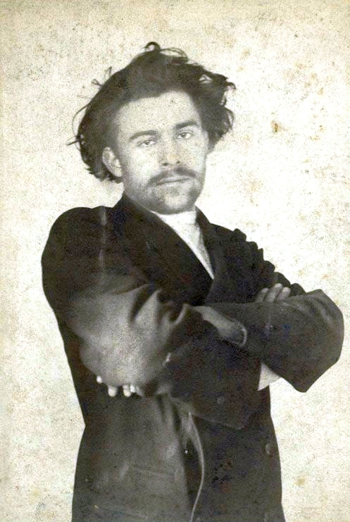 Фотопортрет Лукиана Васильевича Попова